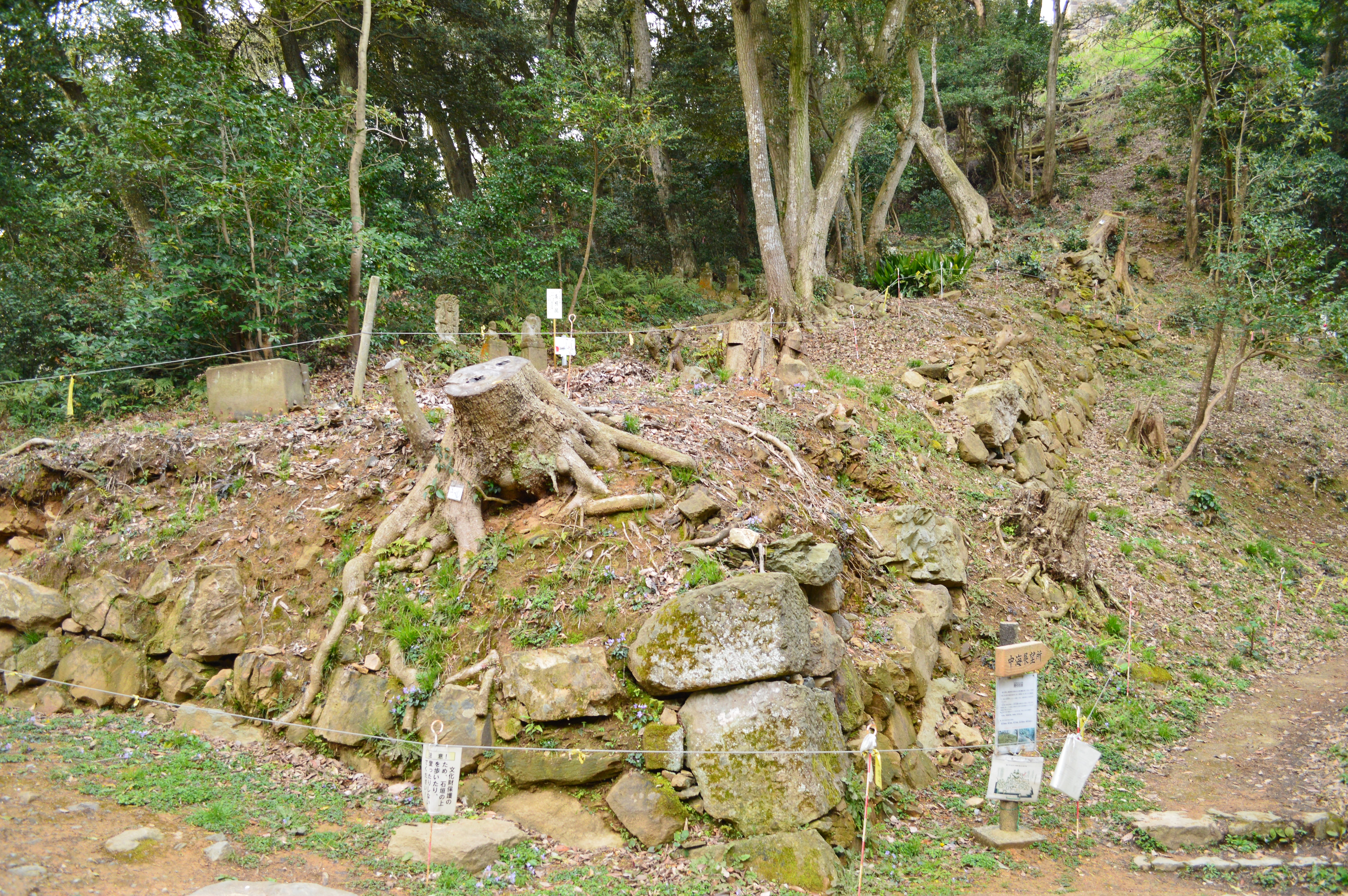 米子城 登り石垣 Nikon D3200